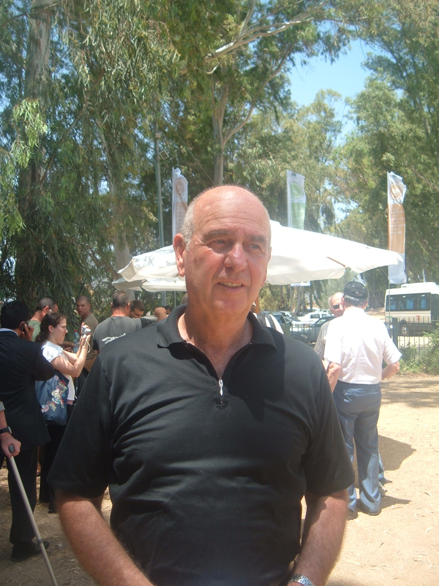 Israeli politician Matan Vilnai מתן וילנאי, בטקס חנוכת מוזיאון רכבת העמק בכפר יהושוע, שישי ביוני אלפיים ושמונה